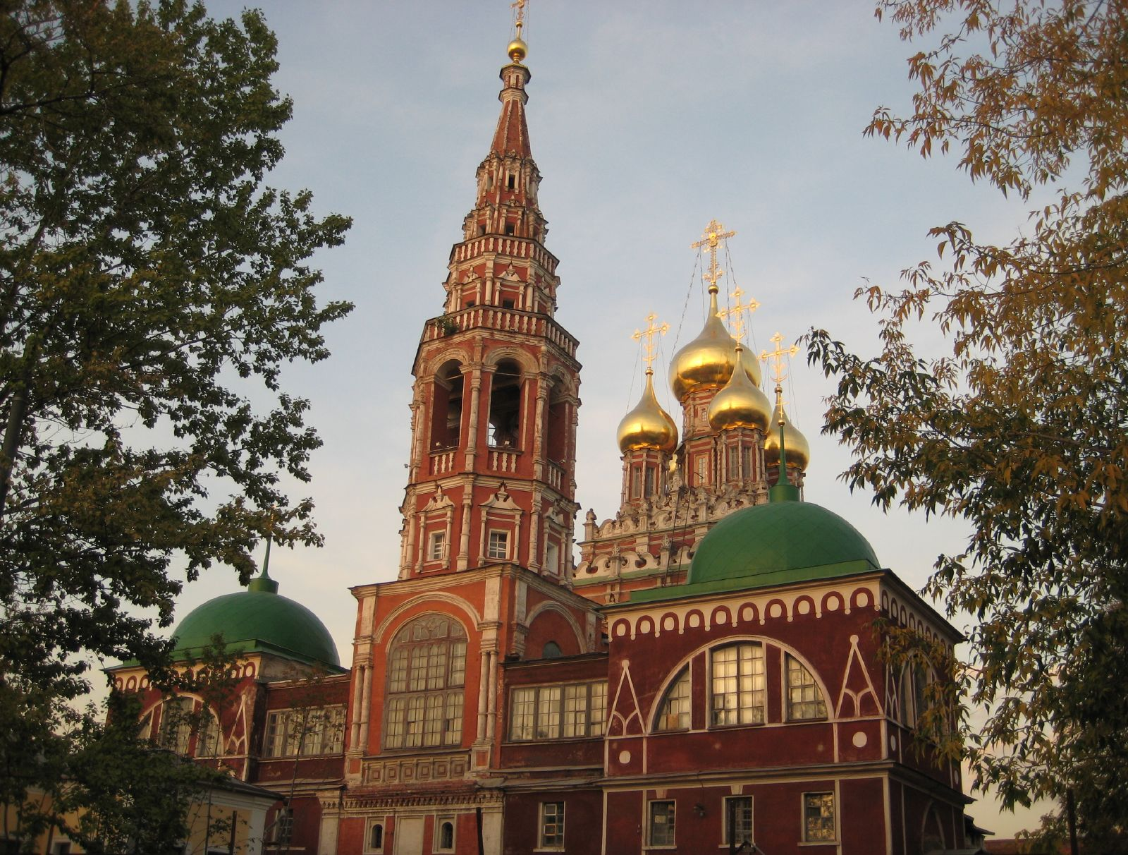 Tretyakovskaya Church View